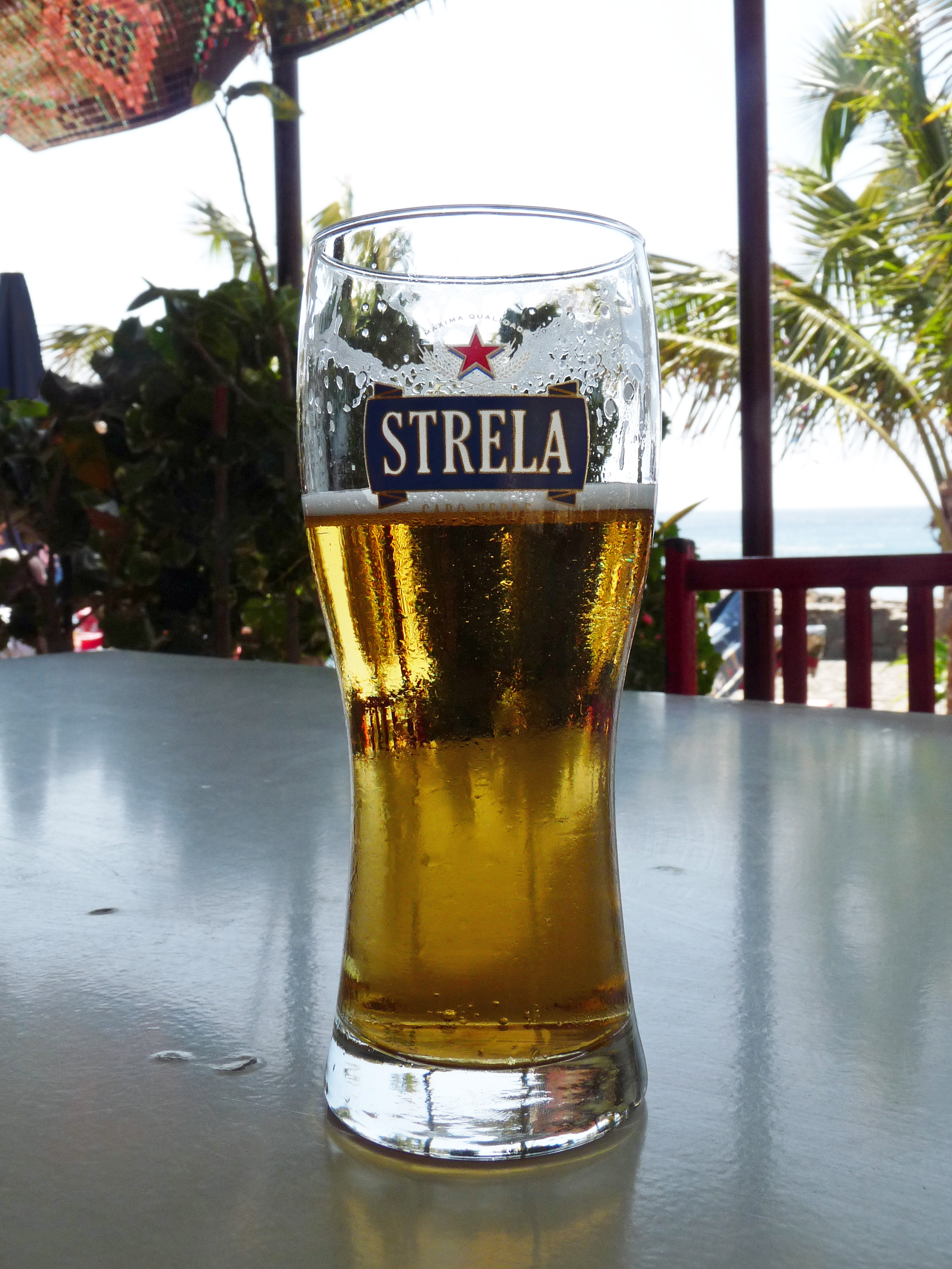 Bière nationale Strela à Cidade Velha (Cap-Vert)